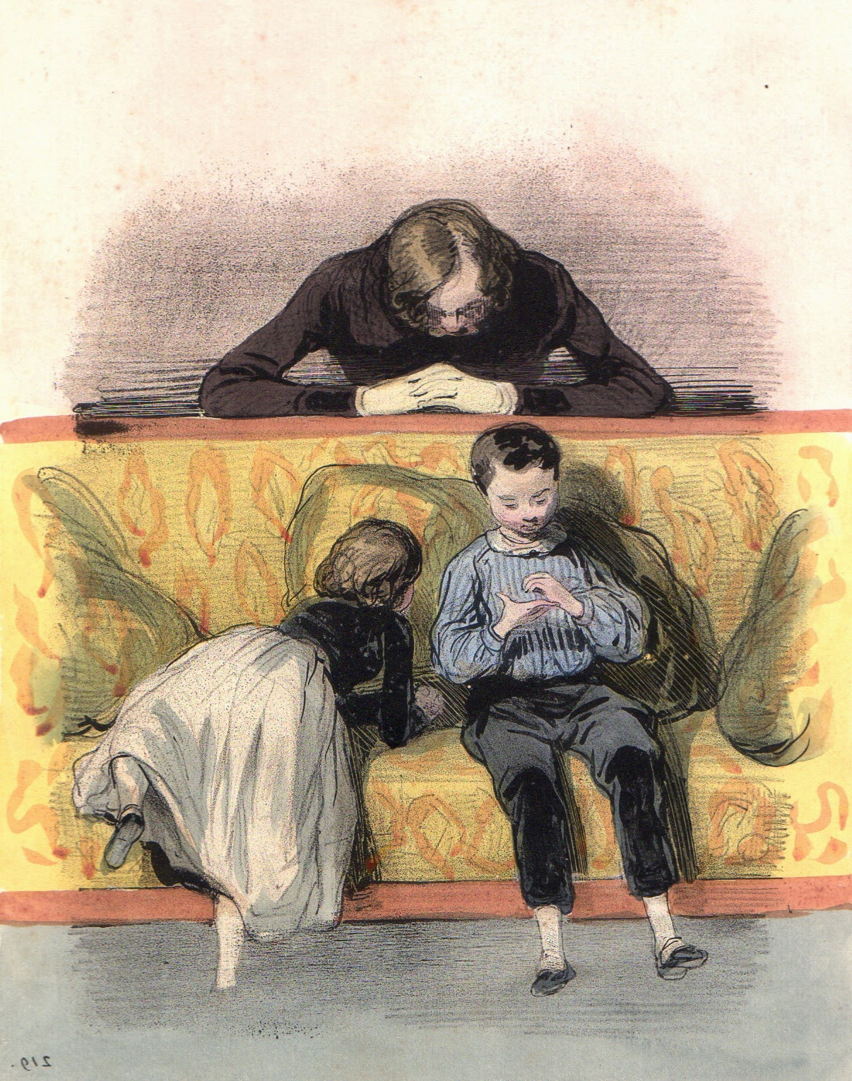 Поль Гаварни. Литография. Серия "Les Enfants Terribles". Около 1840